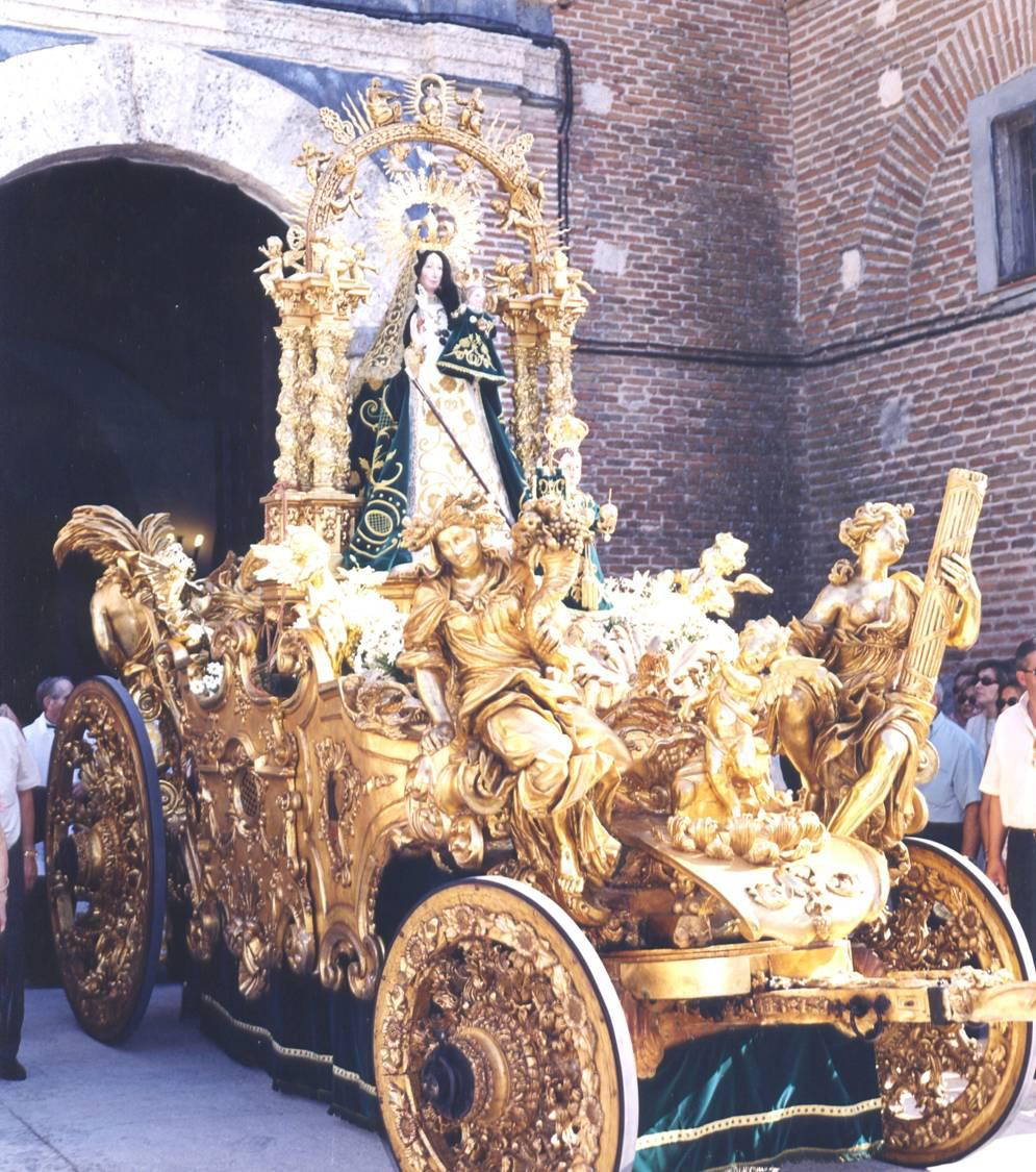 Imagen de la Virgen de la Caridad en su carroza barroca